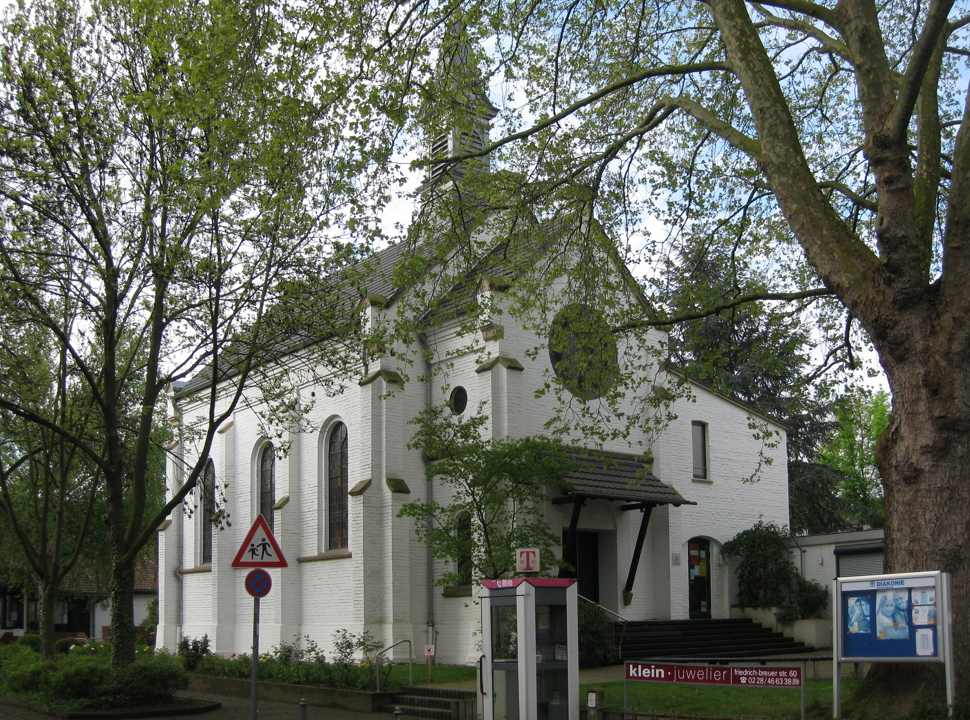 Bonn-Beuel Mitte; Ecke Siegfried-Leopold-Straße/Neustraße: evangelische Versöhnungskirche.